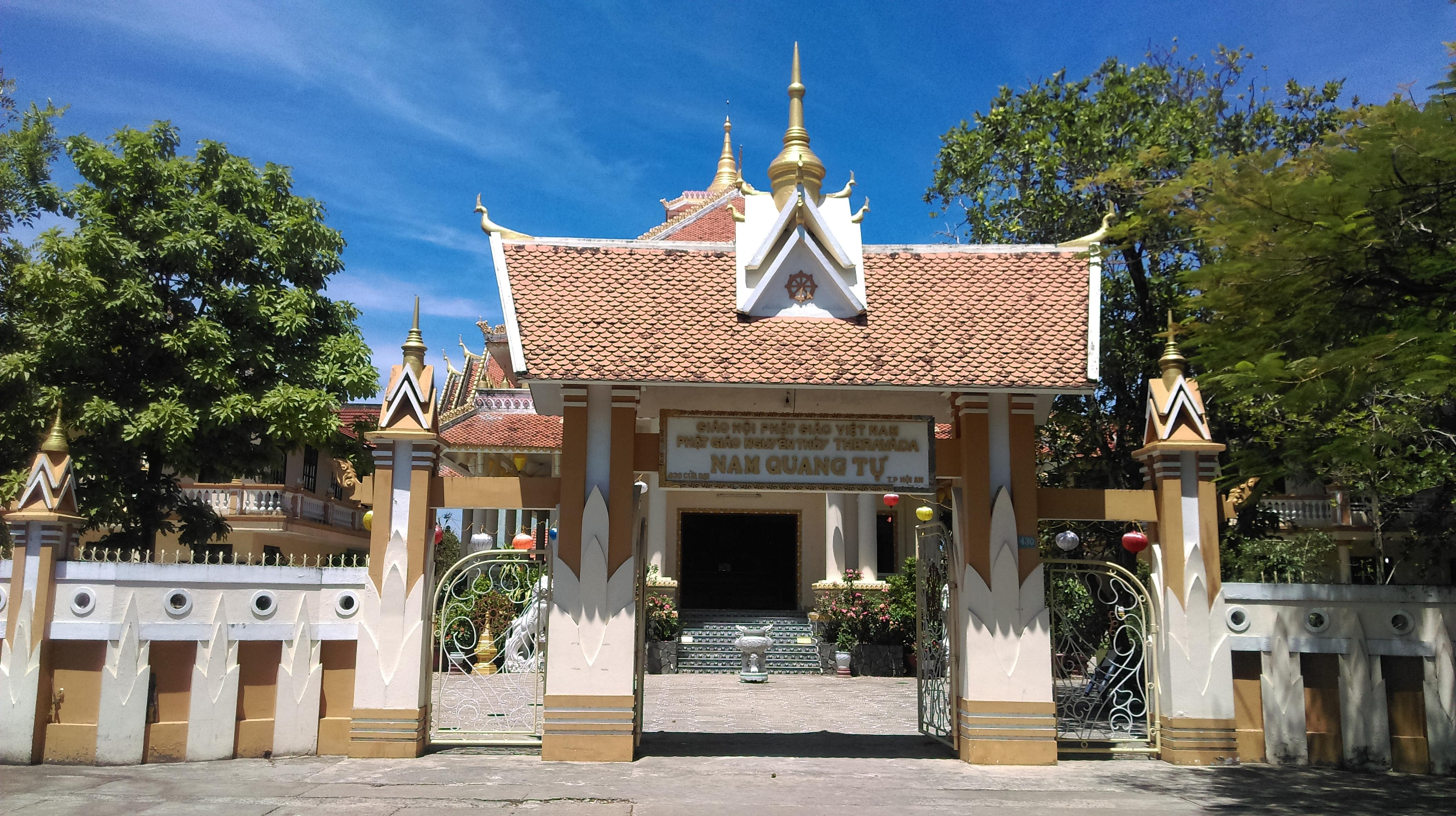 Nam Quang Tự, Hội An, Quảng Nam